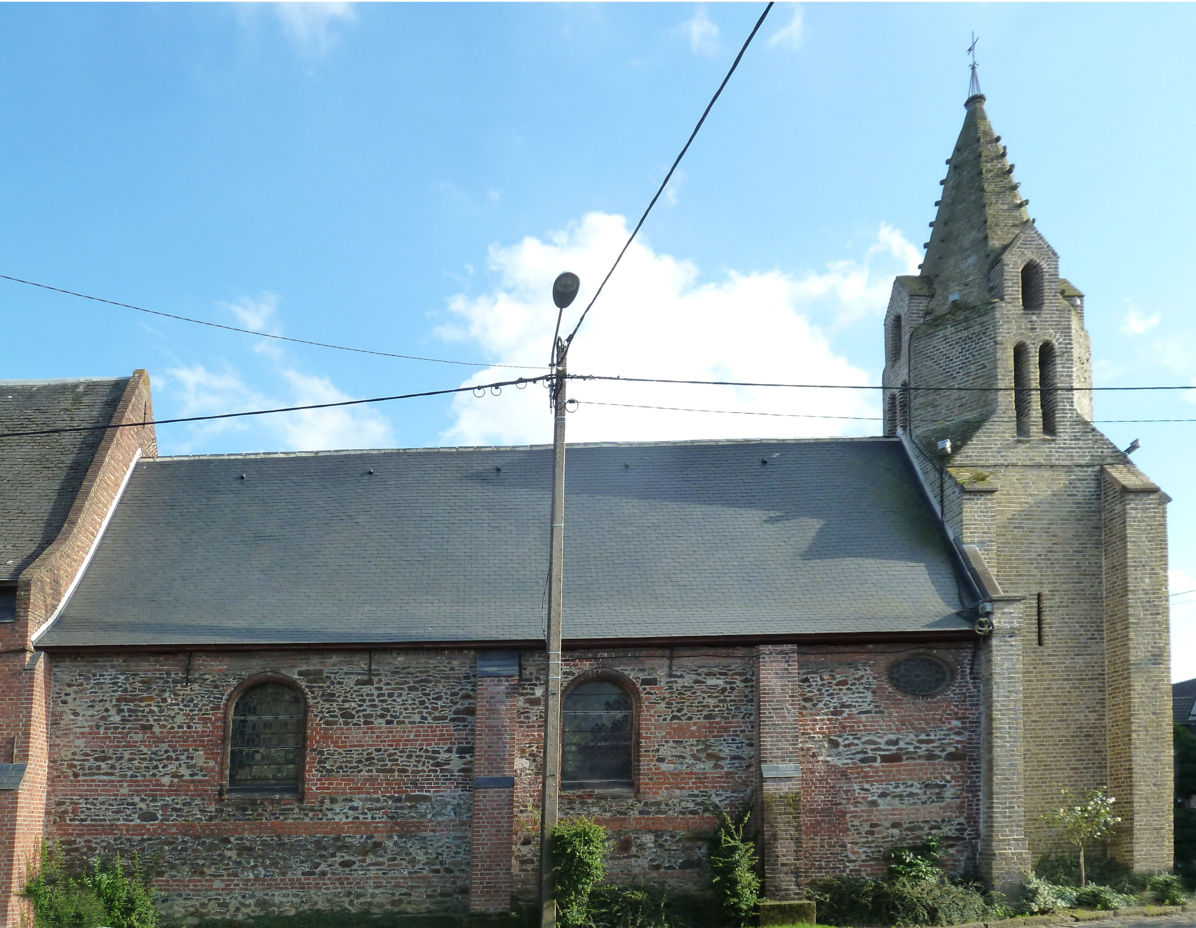 la chapelle des 3 vierges Caëstre, Nord, France